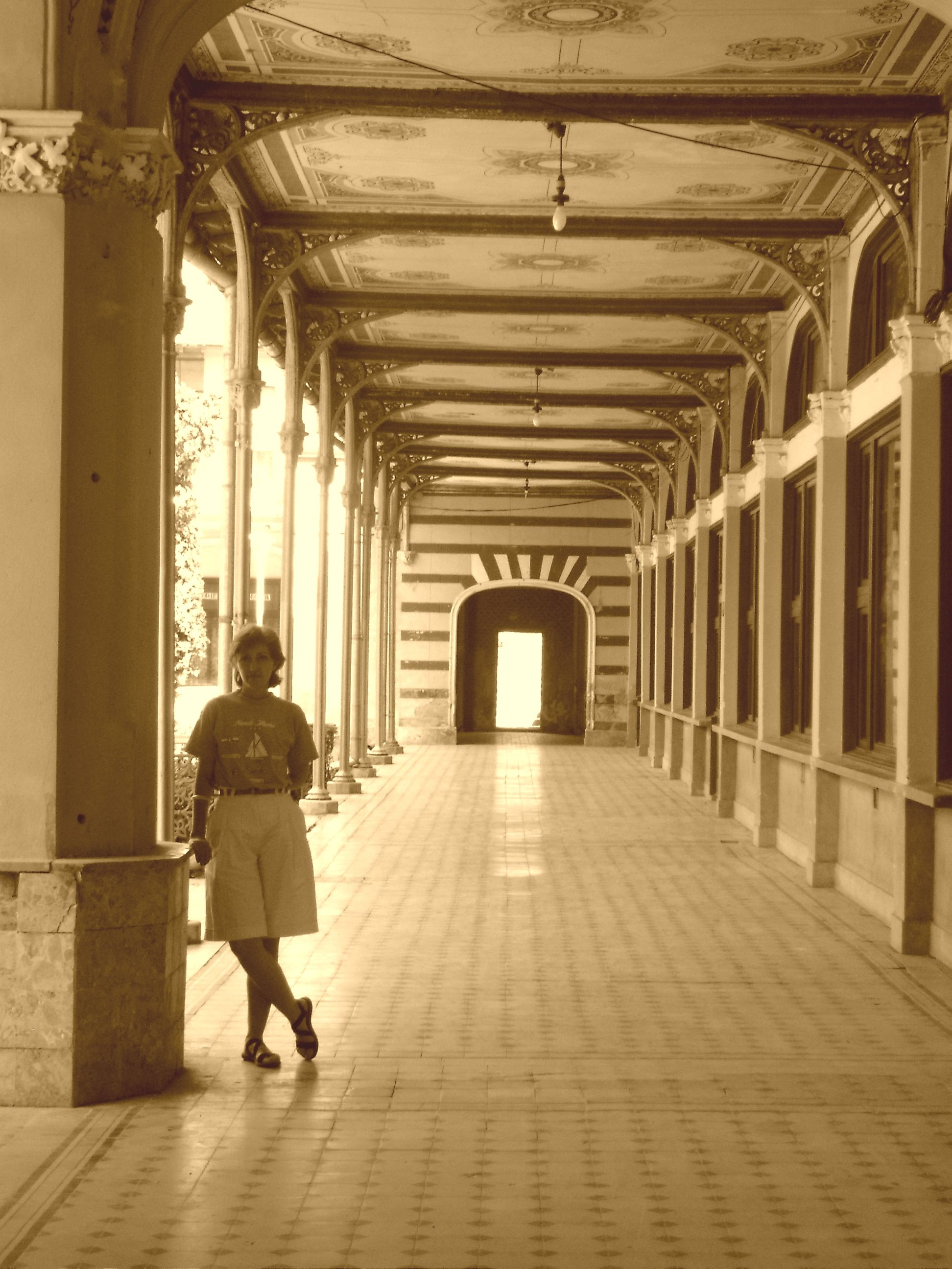 Cazinou, azi muzeu, sală de spectacole, spații comerciale, restaurant 01